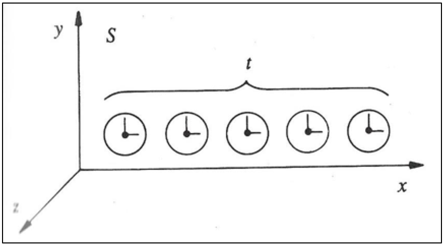 Sistemako puntu guztietako erloju sinkronizatuak